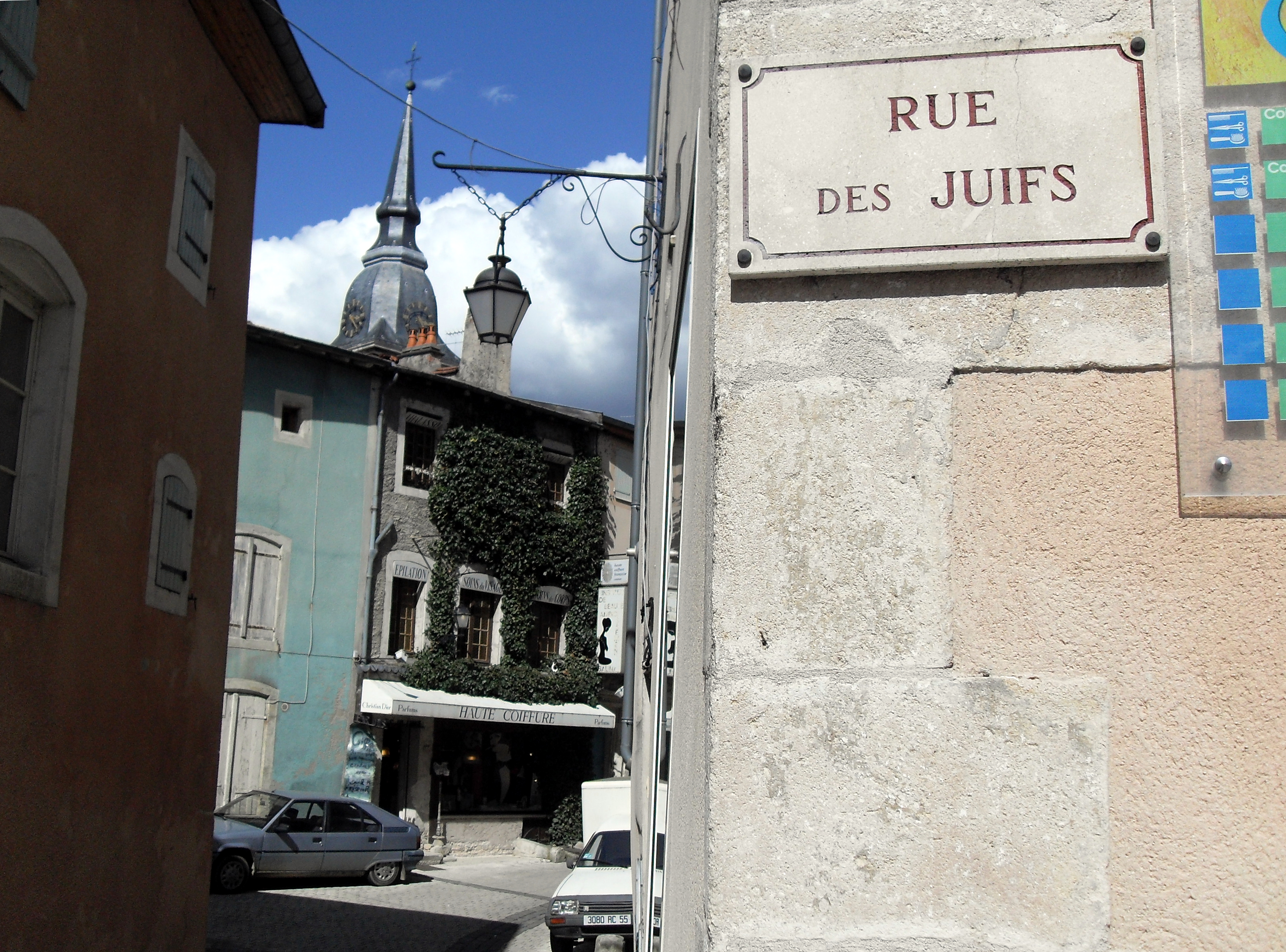 Commercy (Meuse, France) - La Rue des Juifs se trouve à l'ombre du clocher de l'église...